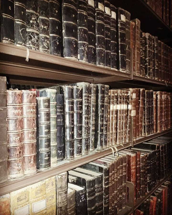 ספרים נדירים ספריית מסגד אל-אקצא